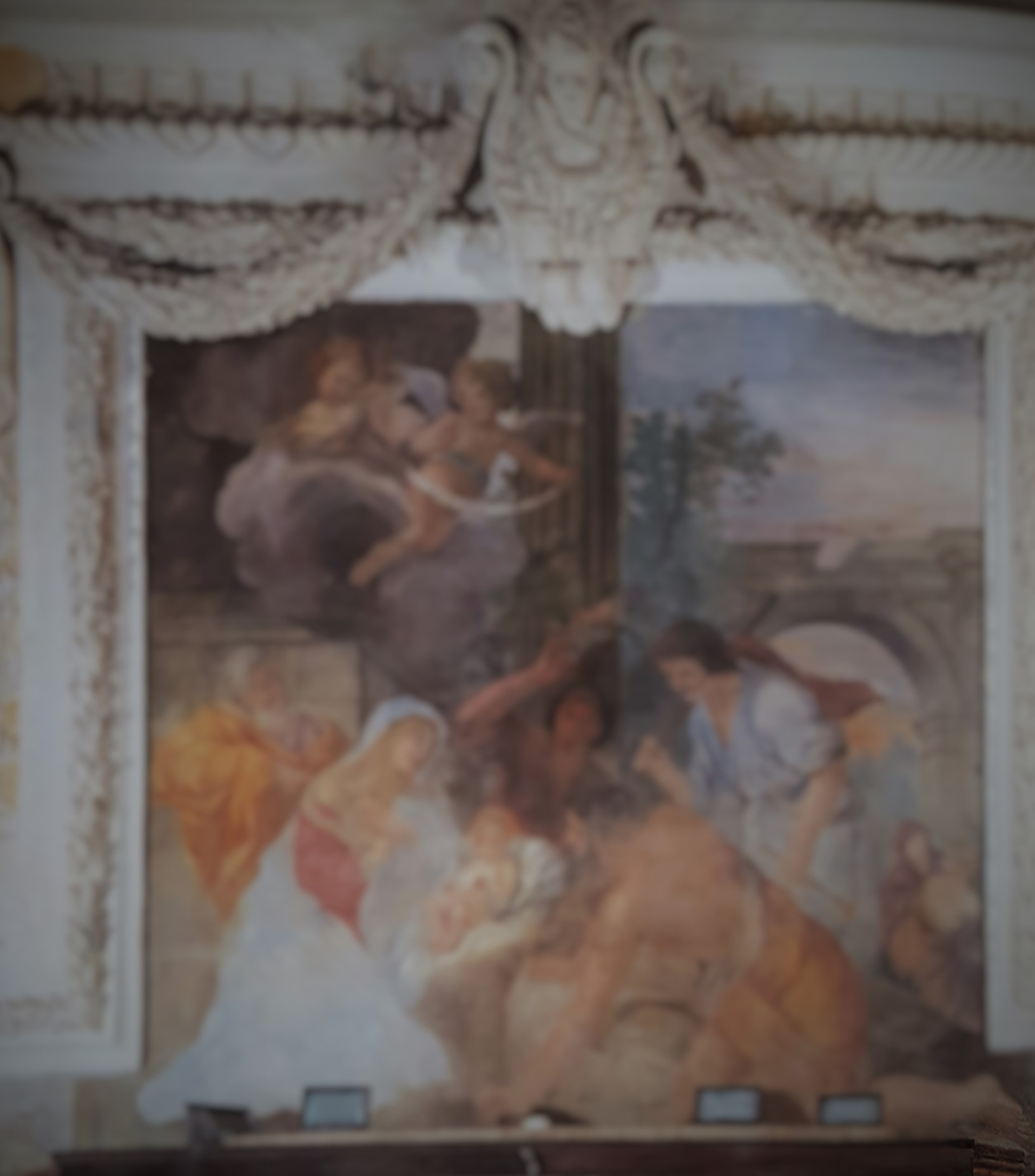 Affresco